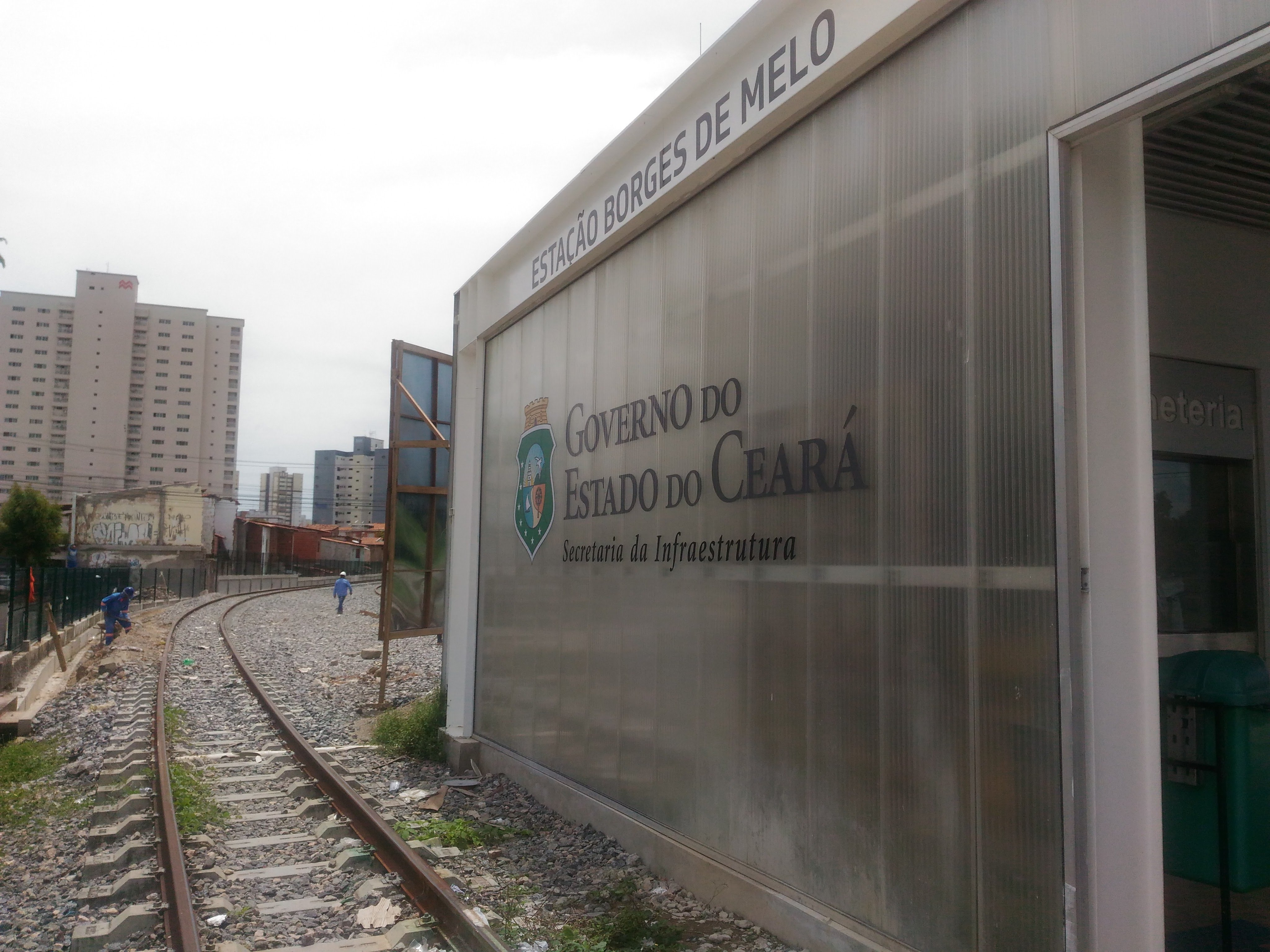 Acesso a estação Borges de Melo do VLT.